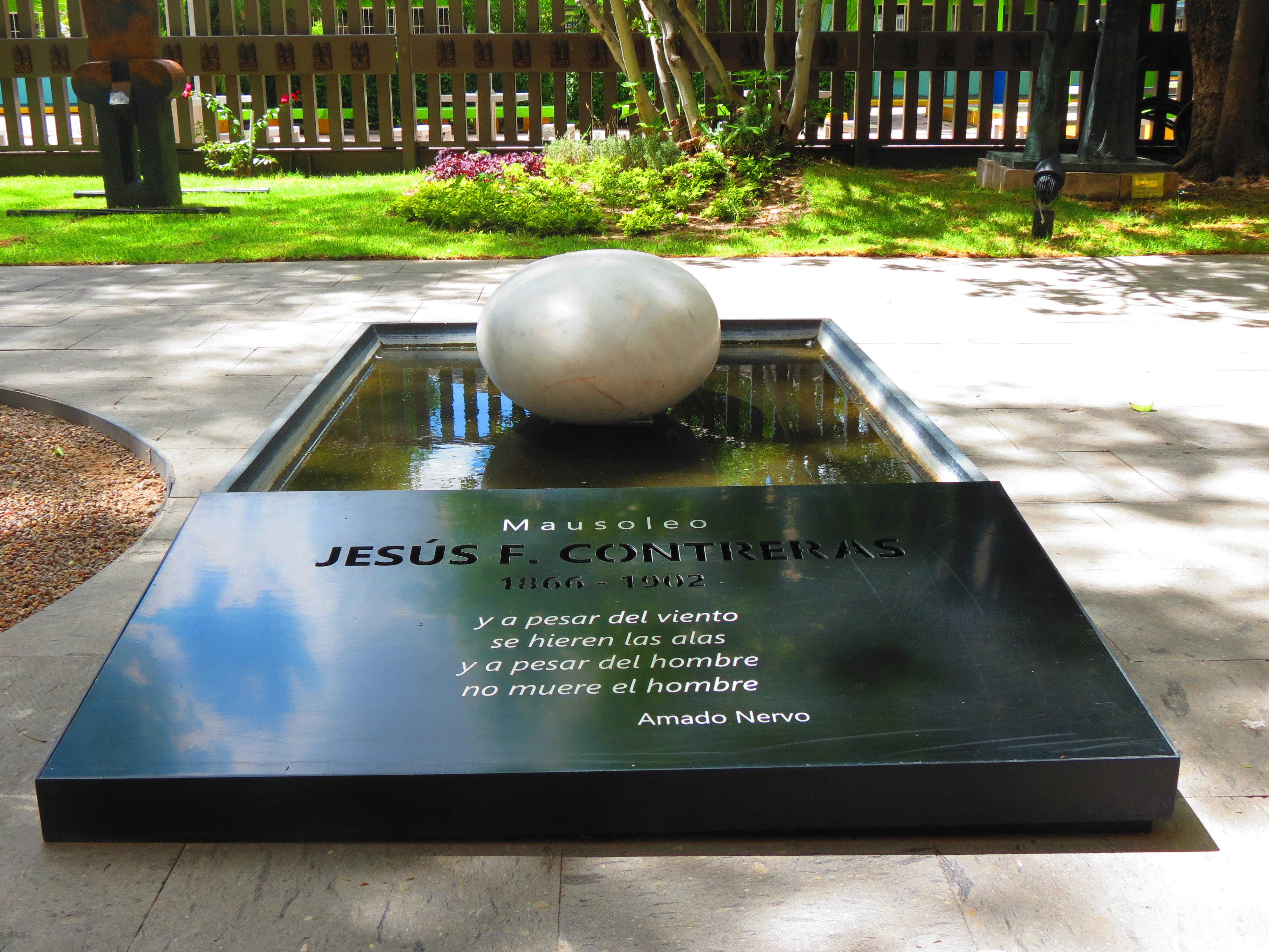 Mausoleo Jesús F. Contreras en el Museo de Aguascalientes. El poema citado, está incorrectamente atribuido a Amado Nervo.